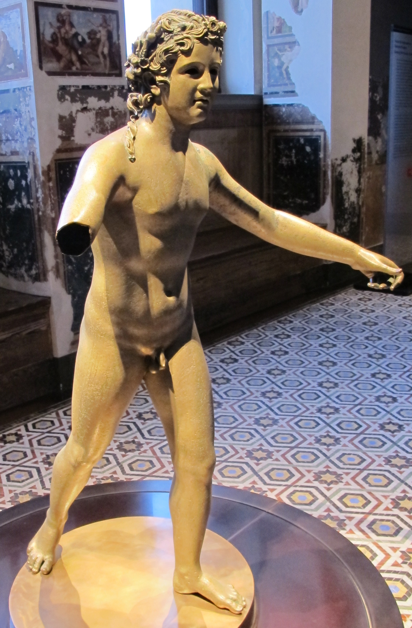 Xantener Knabe